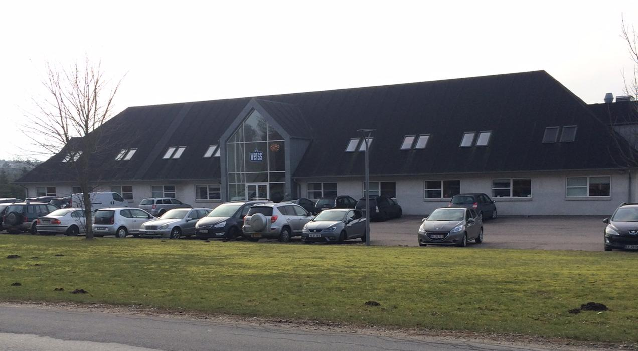 Weiss's afdeling på Norgesvej i Hadsund.